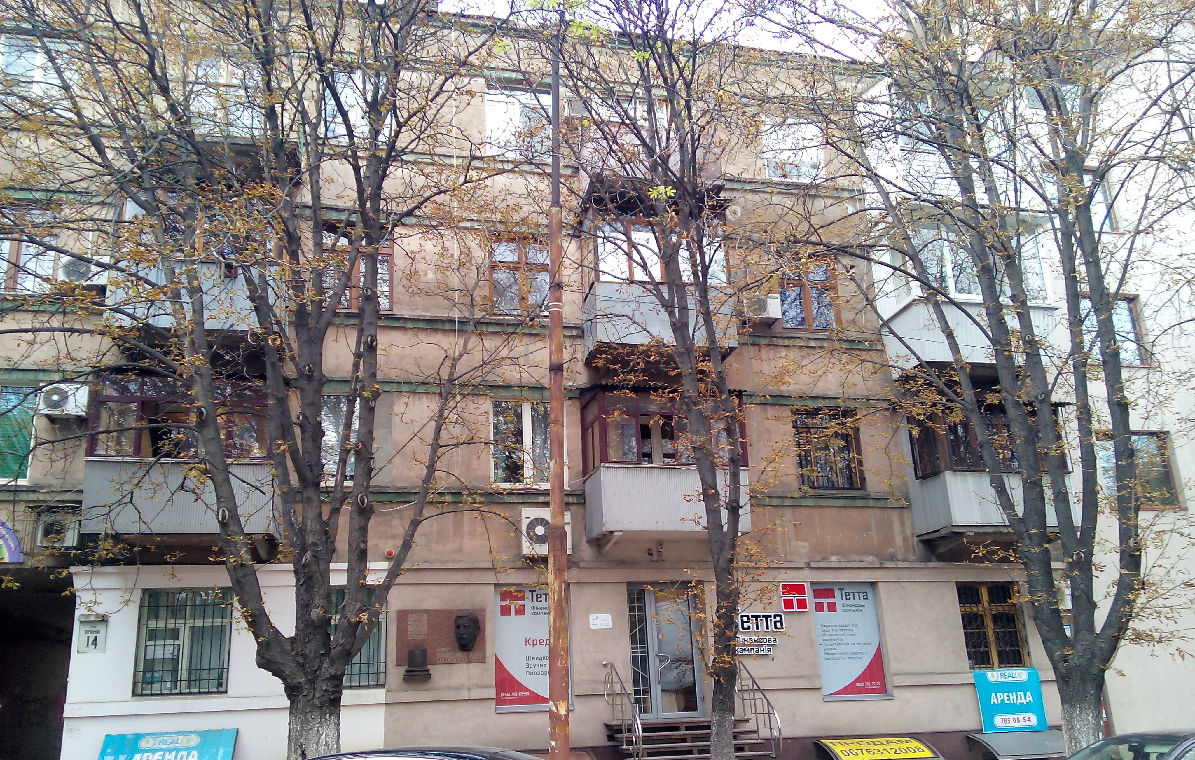 Будинок, у якому мешкав архітектор Красносєльський О.Л. (1877-1944) Мем. дошка, Дніпропетровськ, Короленка вул., 14